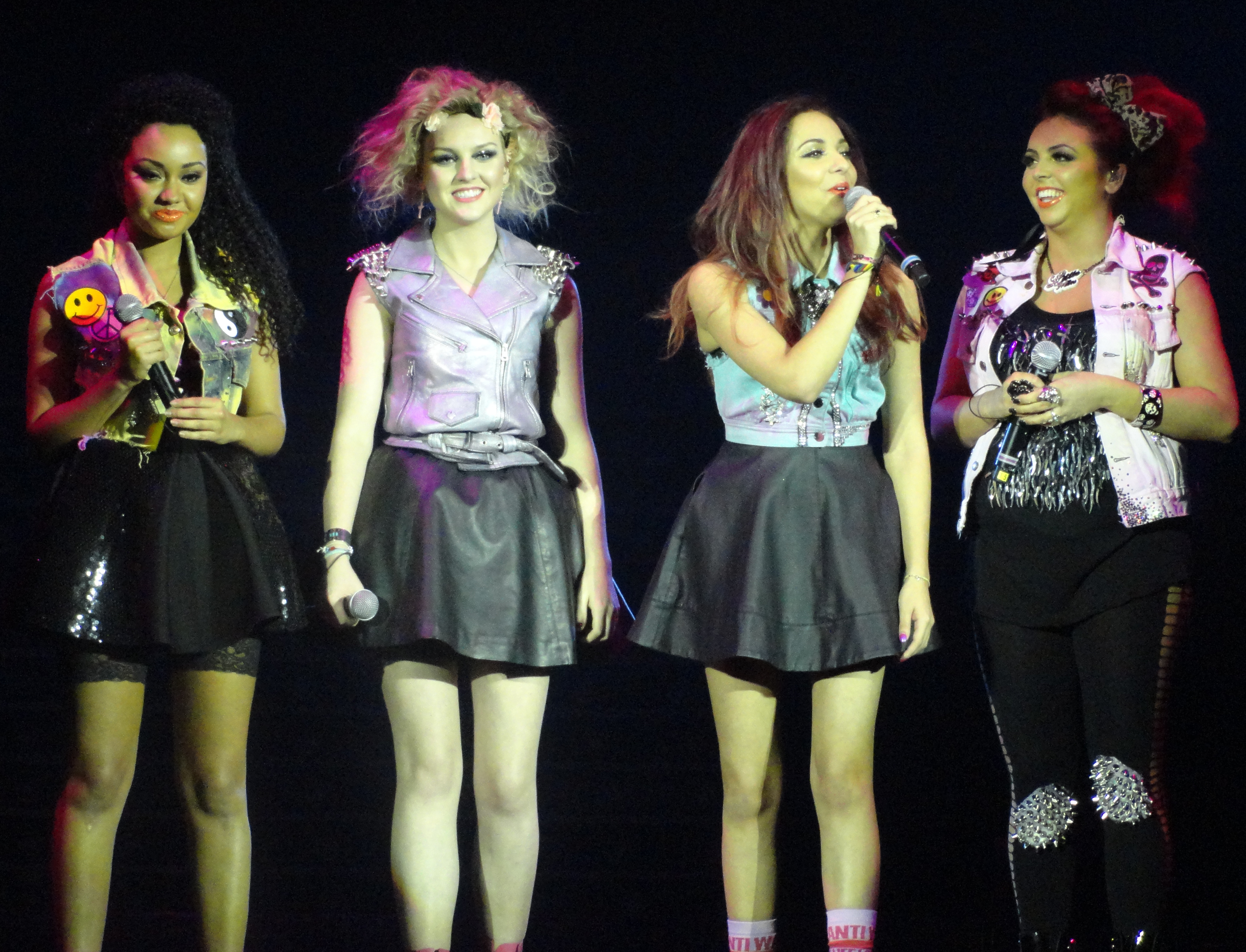 Little Mix